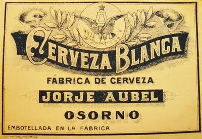 Etiqueta de sus primeros años de funcionamiente